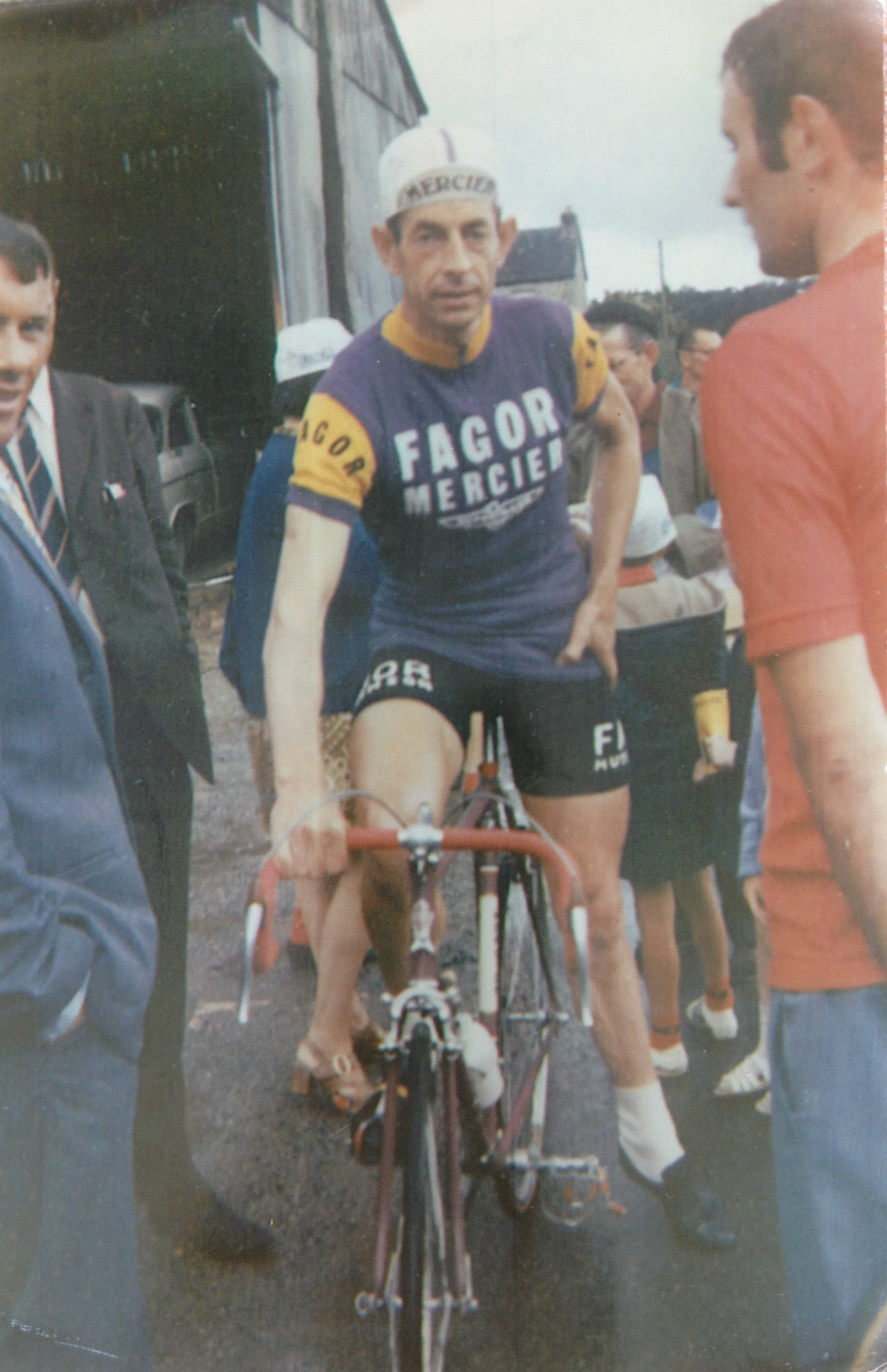 François Le Bihan war velo e 1968 pe 1969